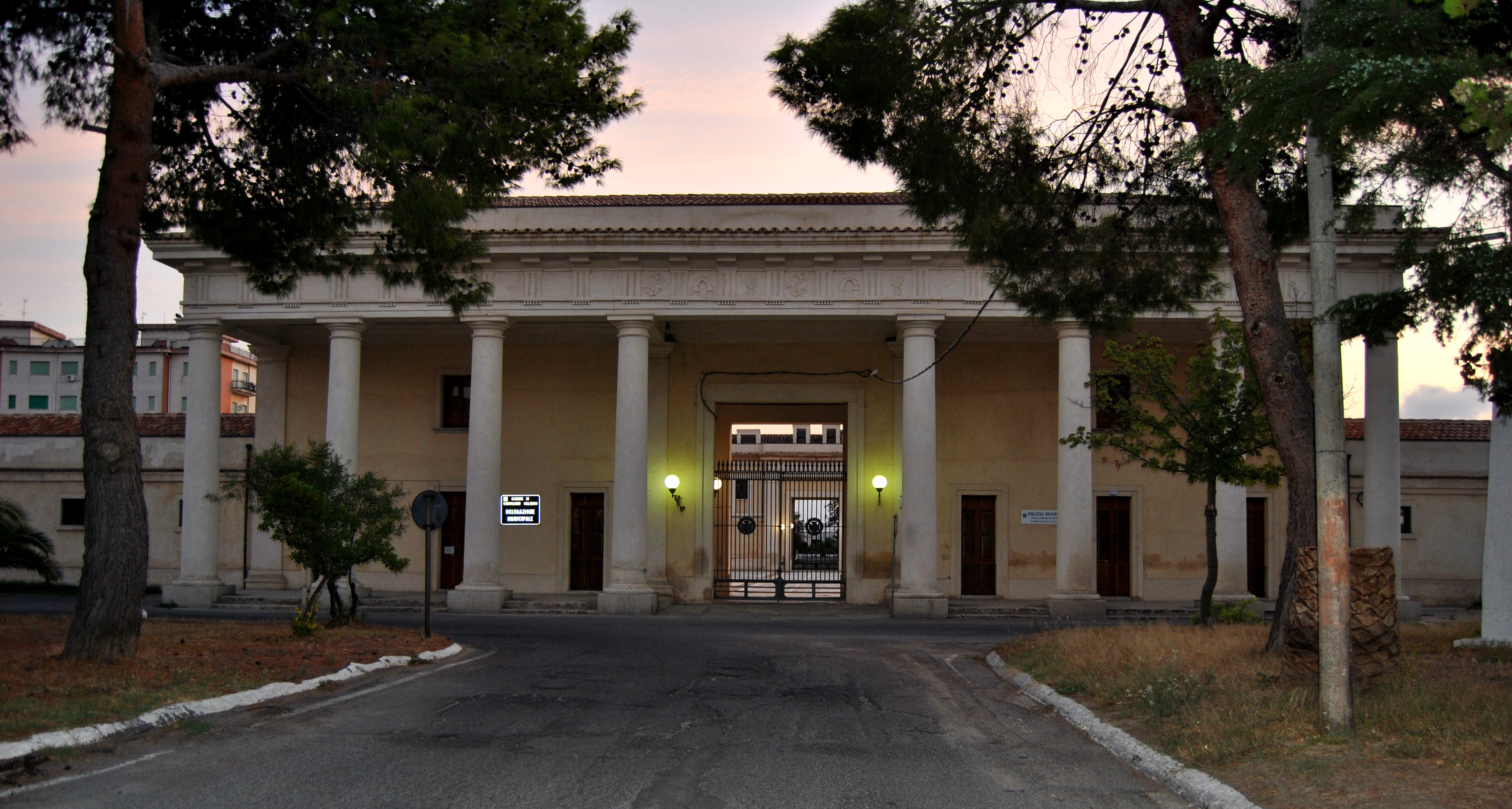 Palazzo delle Fiere o Quadrato Campagna This is a photo of a monument which is part of cultural heritage of Italy.